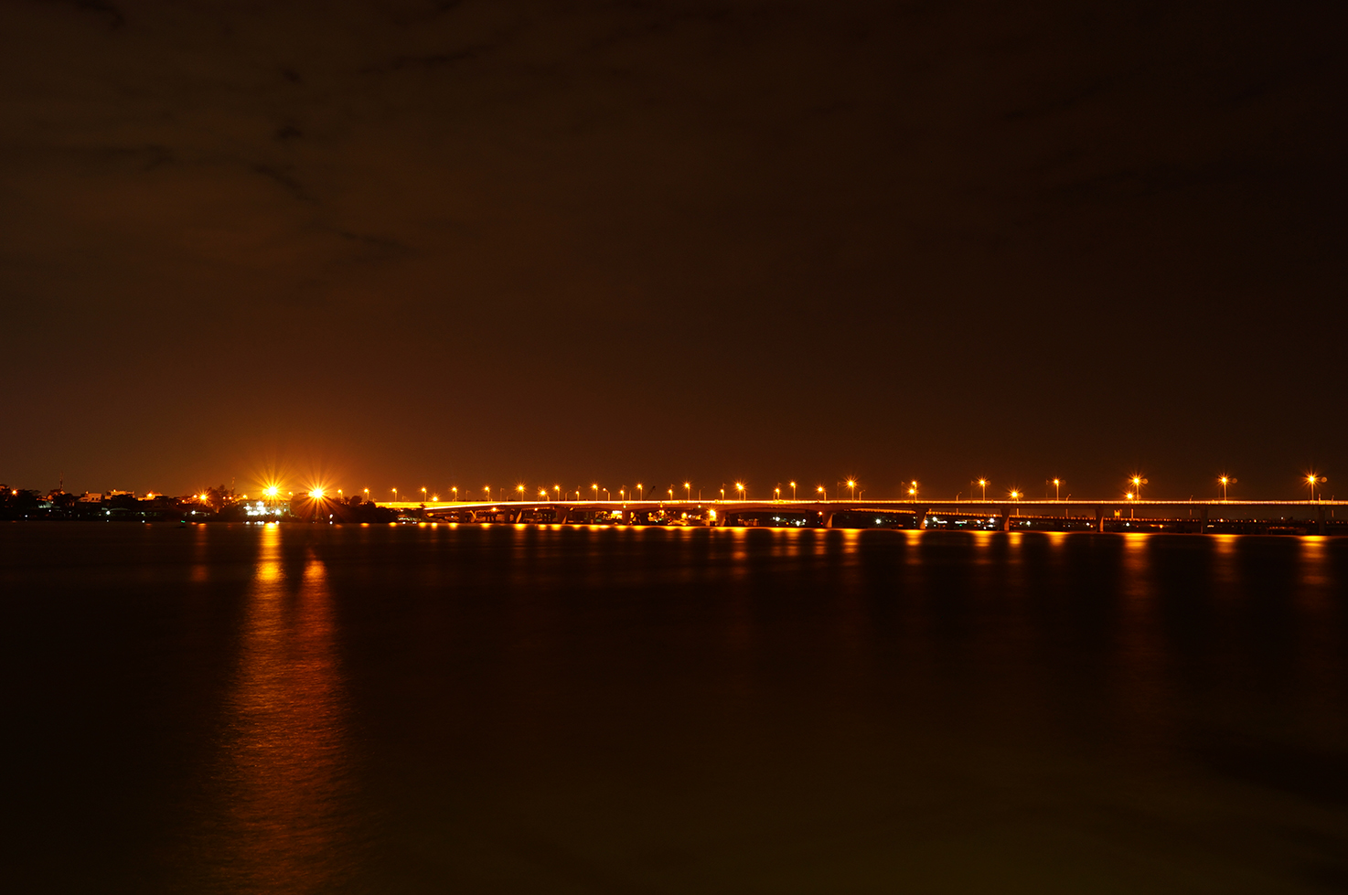 Cầu Hóa An mới, Biên Hòa, Đồng Nai. Xa hơn là cầu cũ.